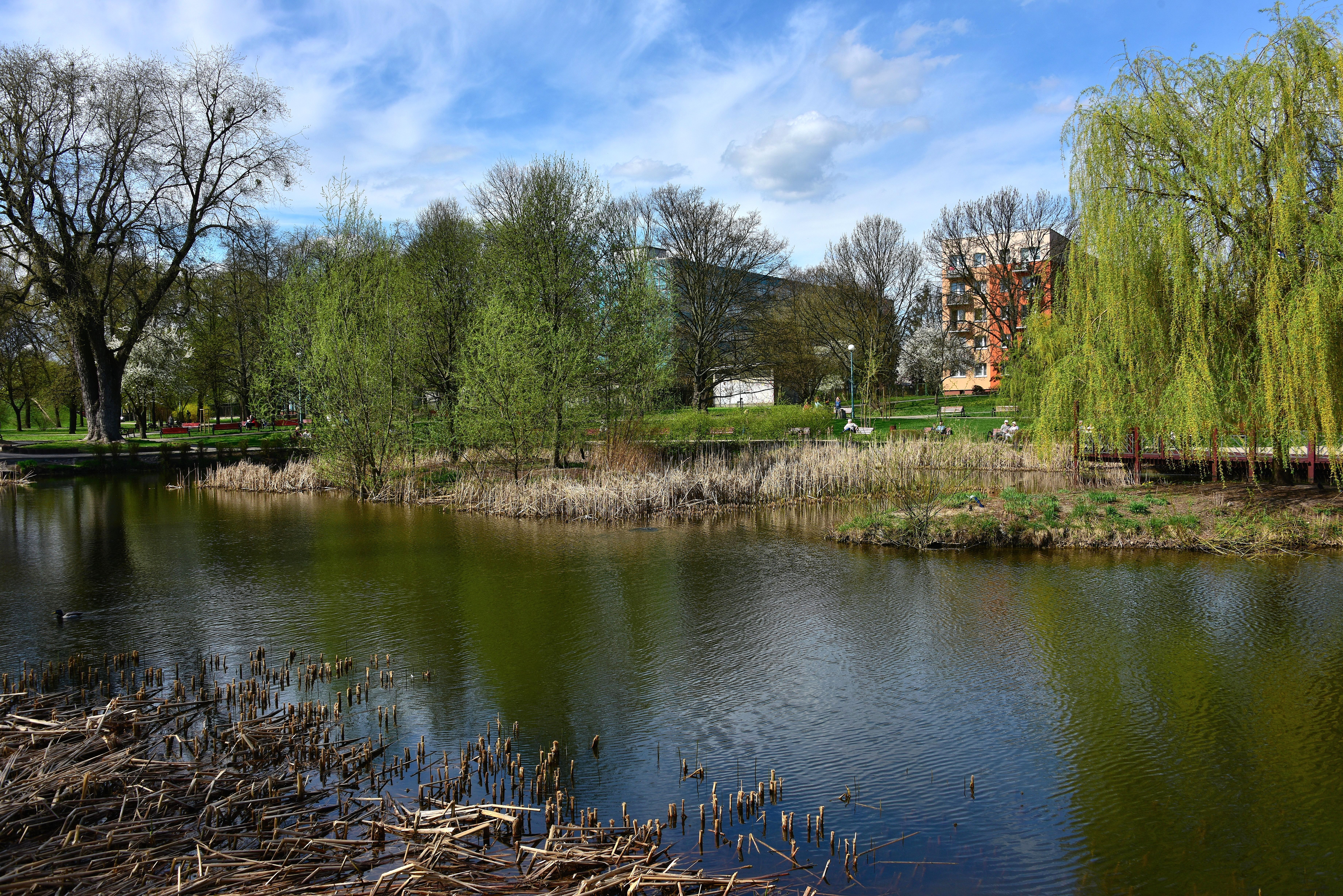 Park im Zasława Malickiego w Warszawie